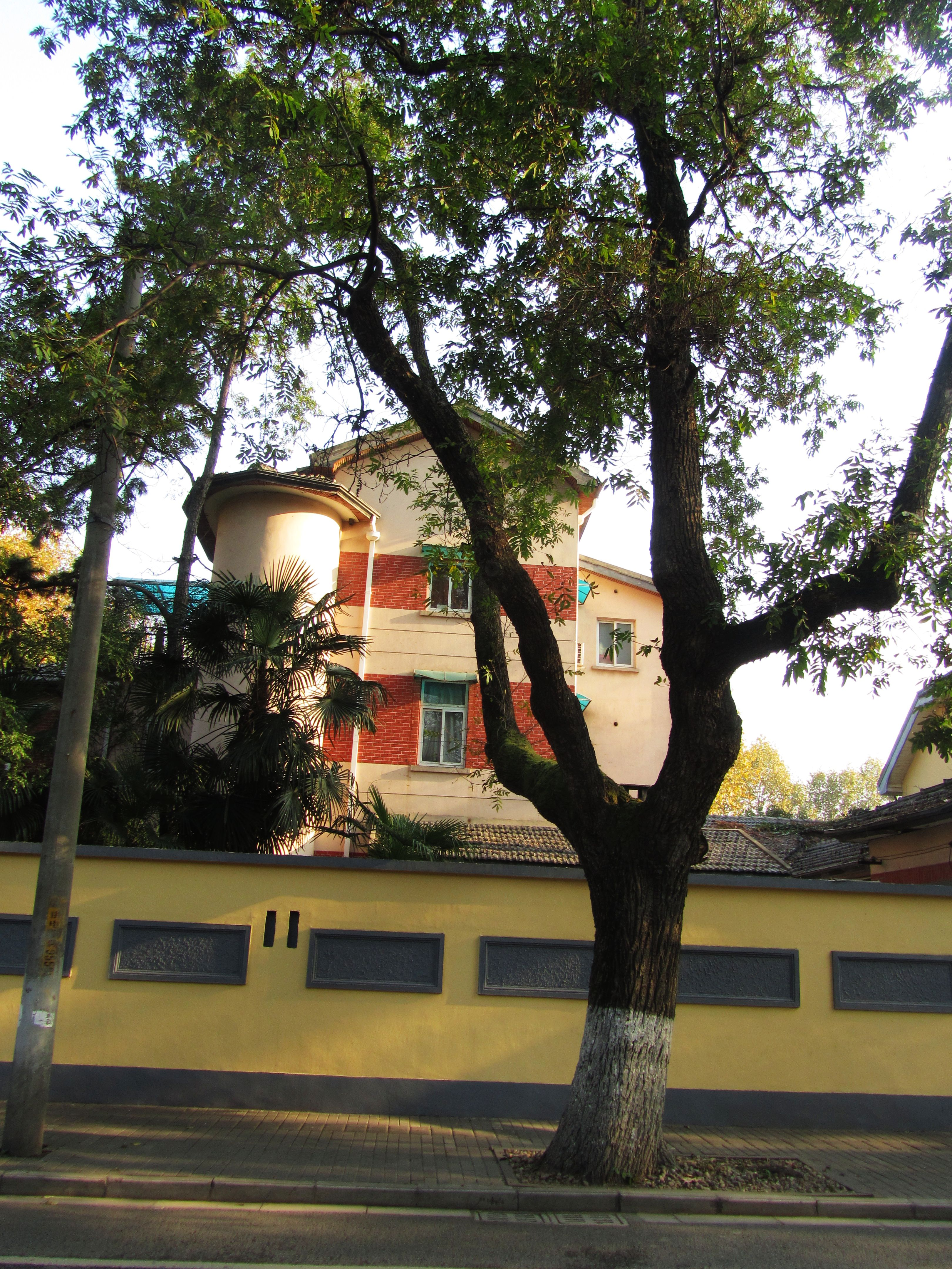 颐和路公馆区——颐和路15号民国建筑，原菲律宾公使馆。